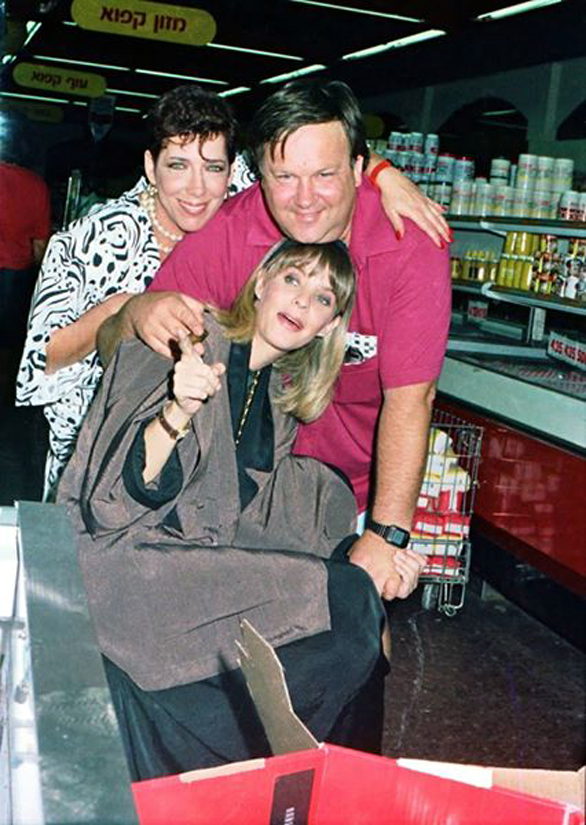 הבמאי של הקרב על המילקי יגאל שילון והשחקניות אביבה פז וחלי גולדנברג בקרב על המילקי 1